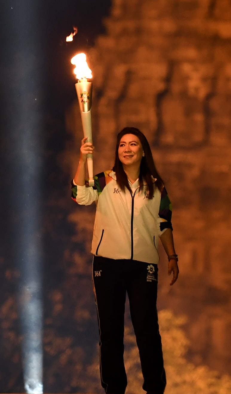 Legenda bulu tangkis Indonesia Susi Susanti membawa api obor dari India saat Asian Games 2018 Torch Relay Concert di Kompleks Candi Prambanan, Sleman, DI Yogyakarta, Indonesia.